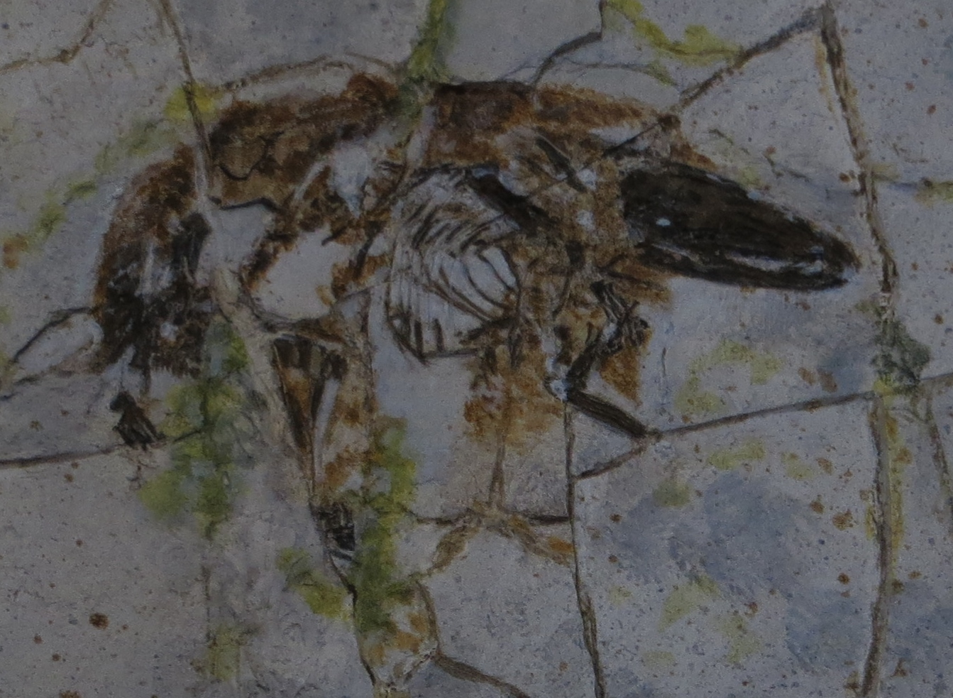 Fossil of Sinodelphys, an extinct mammal - Took the photo at Musee d'Histoire Naturelle, Paris